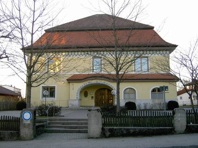 Rathaus der Gemeinde Pöcking in 82343 Pöcking